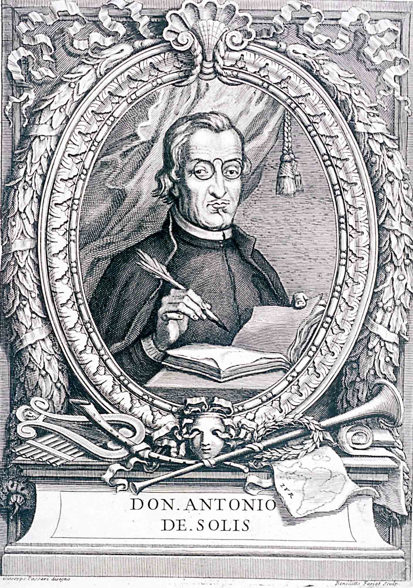 Retrato de Antonio de Solis y Ribadeneyra 1 estampa ; 236 X 167 mm Notas: Inscripción: "Don Antonio de Solís" . - Il. en: Solis Y Rivadeneyra Antonio de. Istoria dell a conquista Del Messico. Scritta in castigliano da Do n Antonio de Solís. E tradotta in toscano da un' accademico della Crusca.Firenze, 1699 . - Ilustración de su obra Istoria della conquista del Messico.Firenze, 1699 Farjat, Benoit (1646-1720). Grabador francés..Passari, Giuseppe. Dibujante. Siglo XVII. Escuela italiana Iconografía Hispana 9005-2